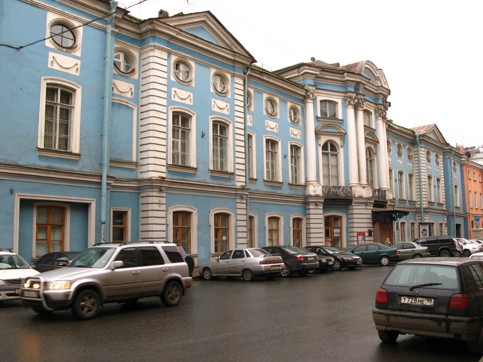 Фасад дома по Итальянской, 25